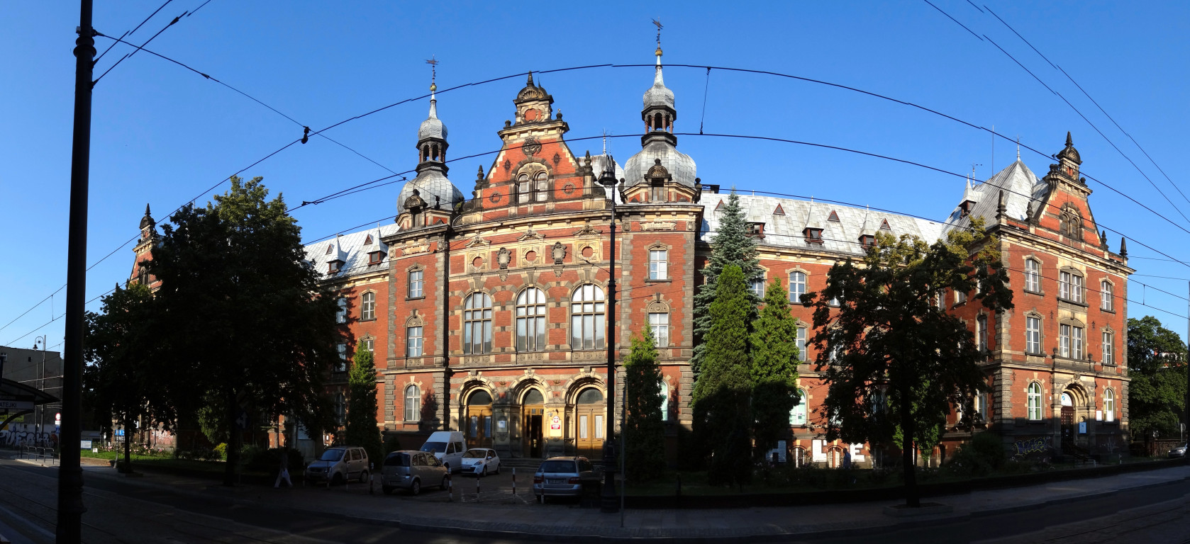 Budynek dawnej dyrekcji Kolei Wschodniej w Bydgoszczy, ul. Dworcowa 63, zbud. 1886-1889, od 2013 r. w gestii Collegium Medicum UMK